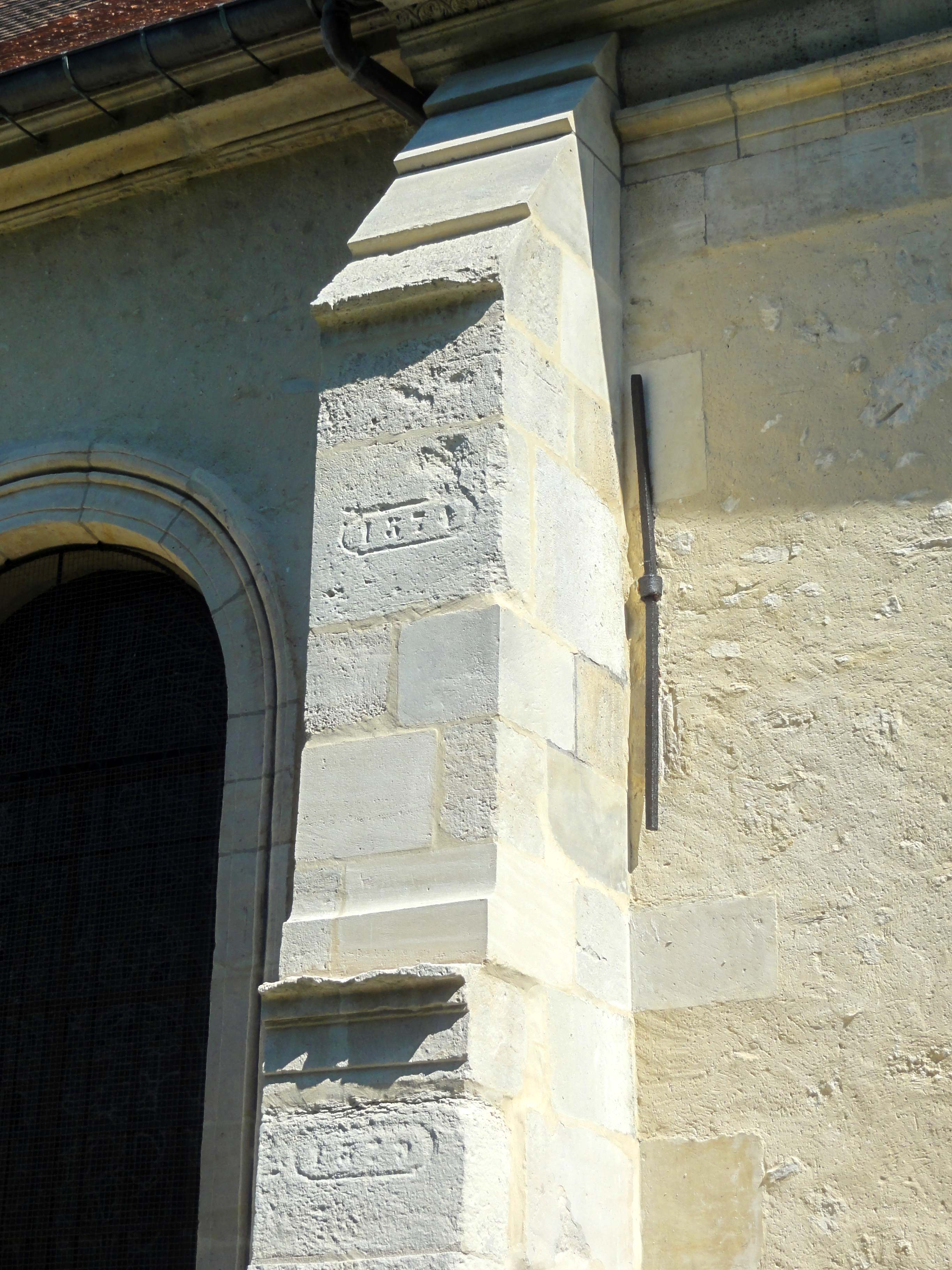 Chapelle sud, contrefort entre la 1ère et la 2e travée.